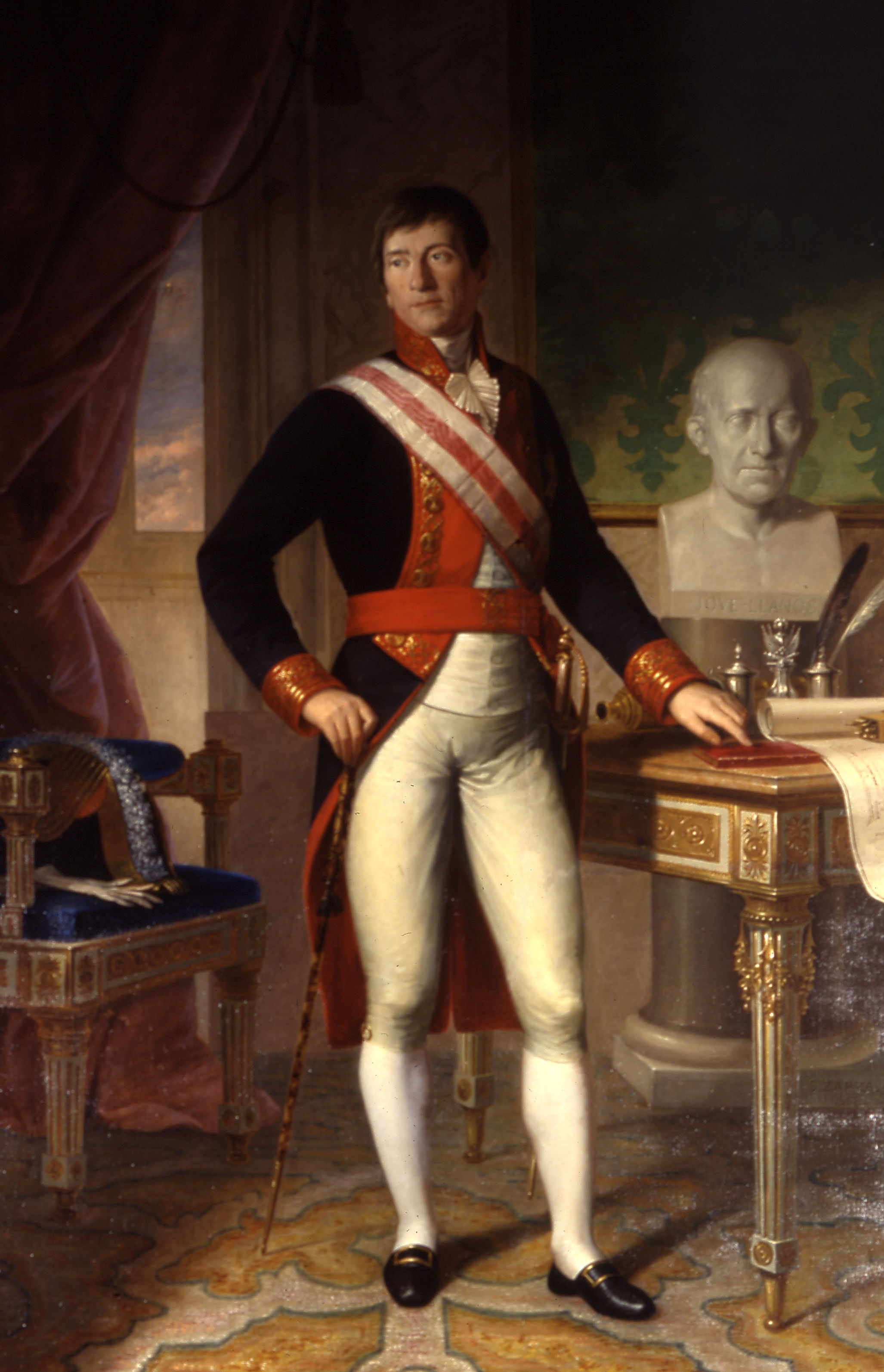 Retrato del marino español Fernando Casado de Torres e Irala (1754-1829), que fue jefe de escuadra y comandante general del Cuerpo de Ingenieros de la Real Armada Española. El retratado aparece de pie y de cuerpo entero y con el uniforme grande de jefe de escuadra, que era común para el Ejército y la Armada, como comandante general del cuerpo de Ingenieros. Además, lleva faja con entorchado y la banda y la placa de la Gran Cruz de la Orden de San Hermenegildo, y en la parte inferior del lienzo consta extensa leyenda con el resumen de sus servicios.